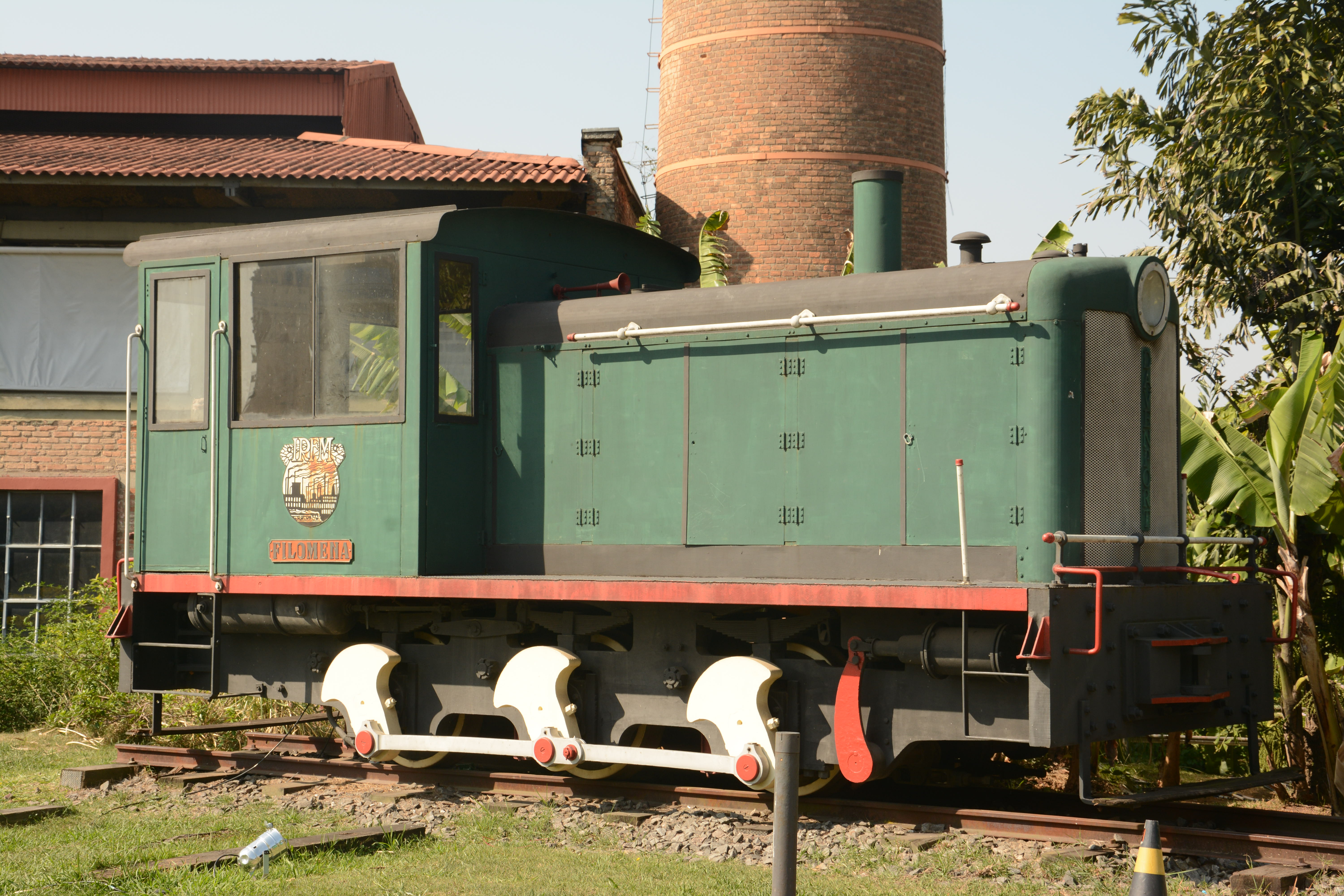 Trem indústrias matarazzo(Barra Funda - São Paulo - SP